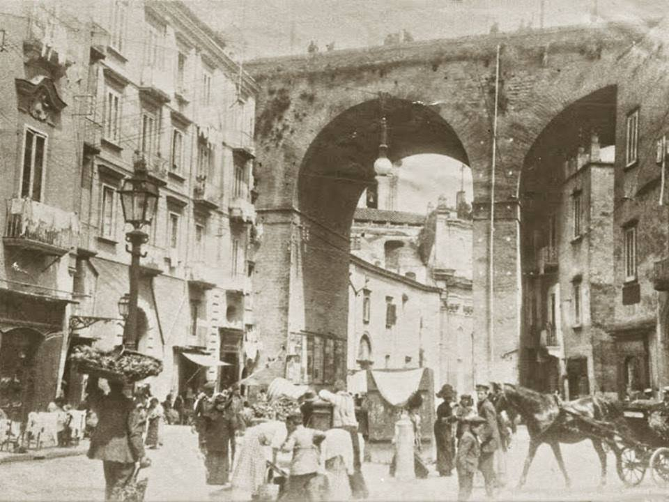 Napoli, il ponte della Sanità. Autore sconosciuto.